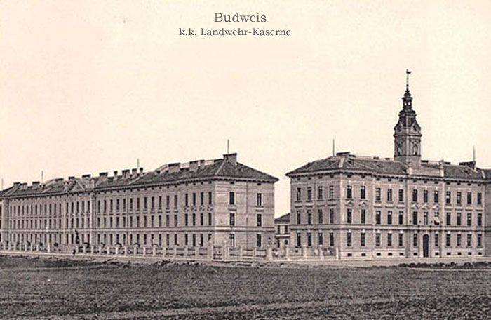 Kasernen in Budweis in Böhmen - links Landwehr Kaserne